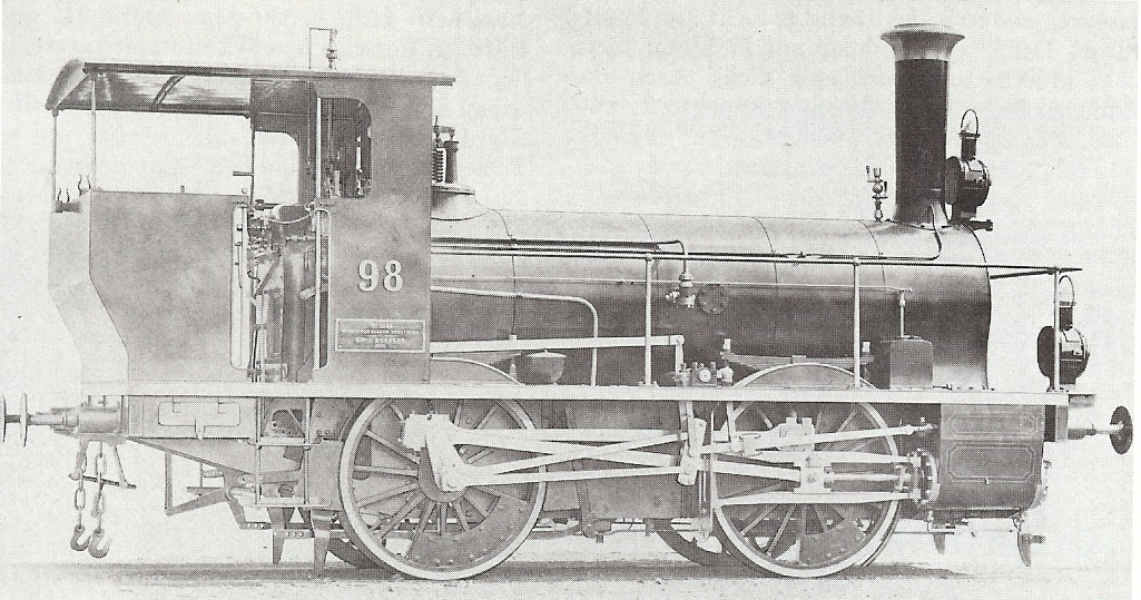 Dampflokomotive E 2/2 Nummer 98 der schweizerischen Nordostbahn